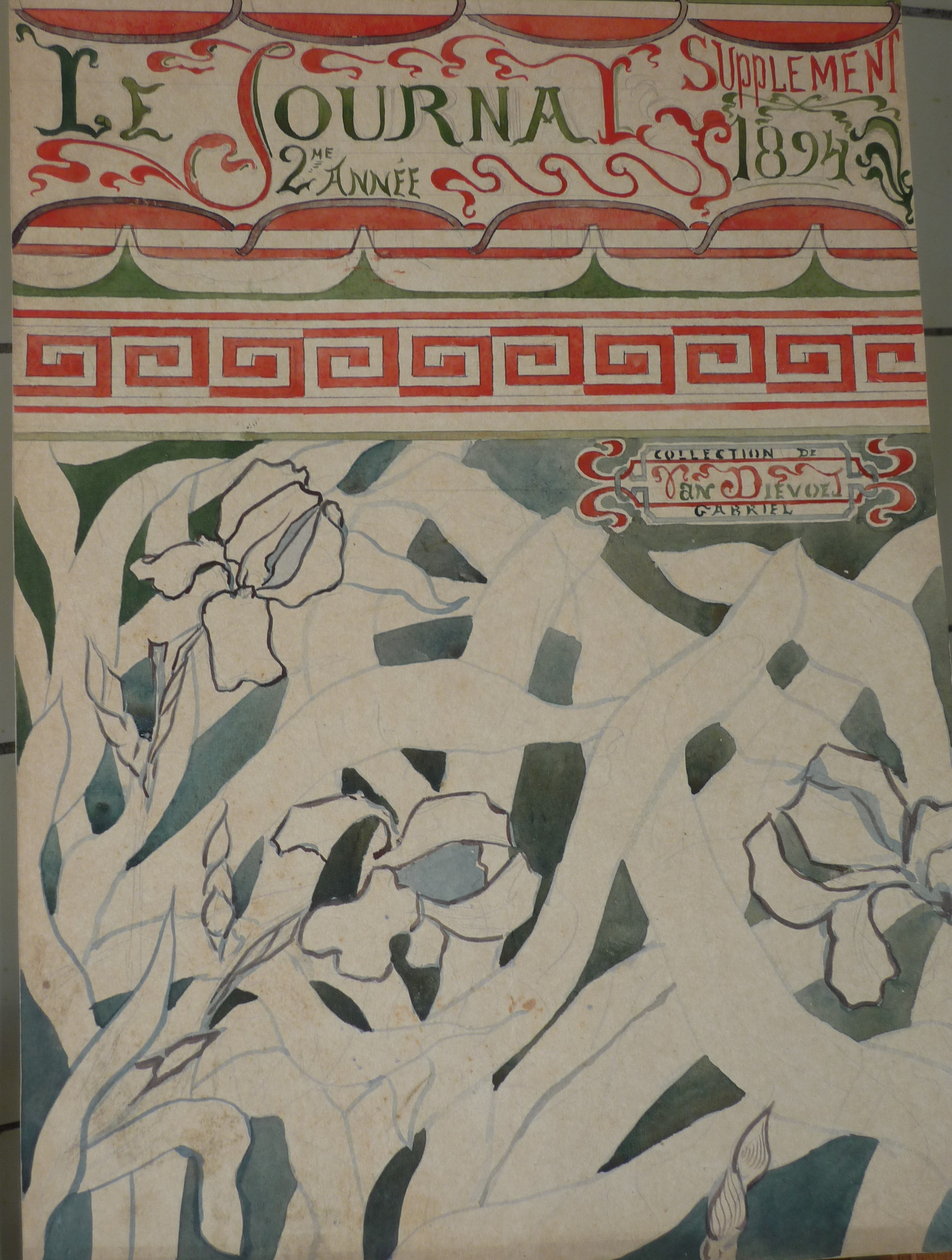 Projet aquarellé de couverture pour Le Journal, Supplément, 1894